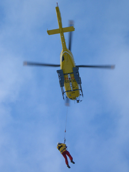 Flugretter am Tau